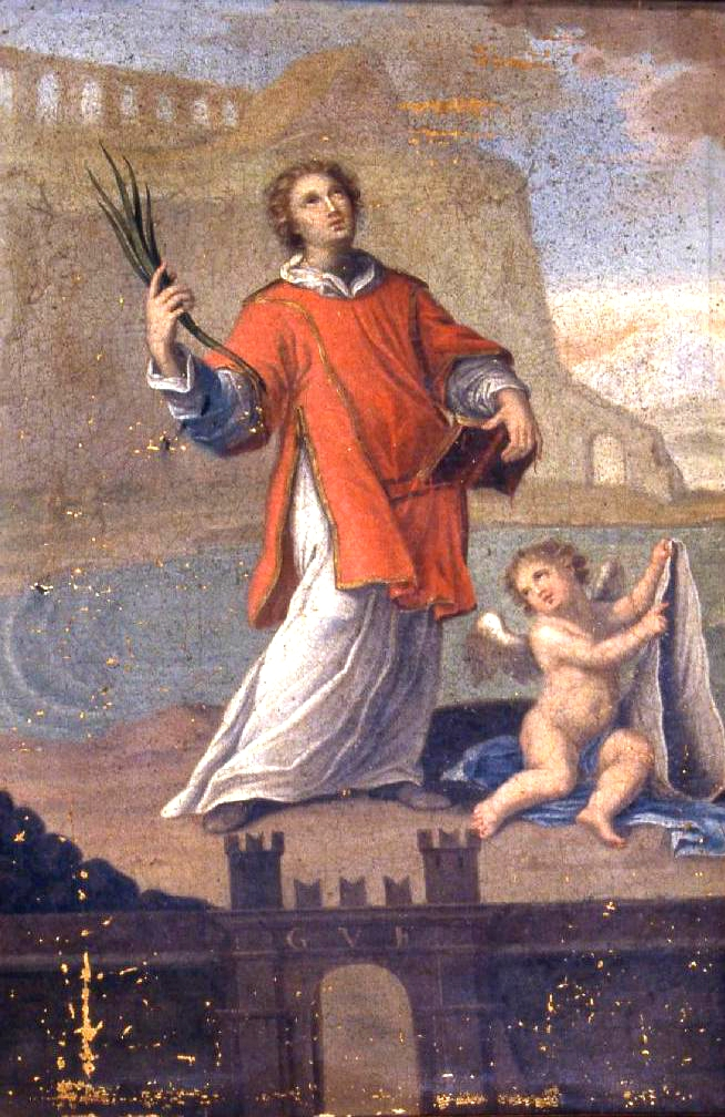 Dipinto "S. Cesareo diacono e martire" di G. Vieste (1805)